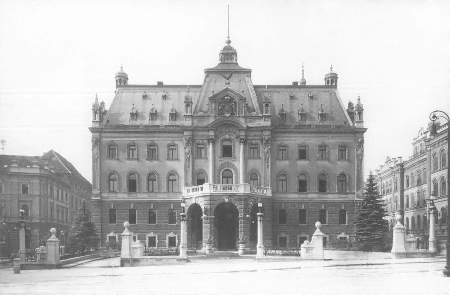 Univerza v Ljubljani 1929